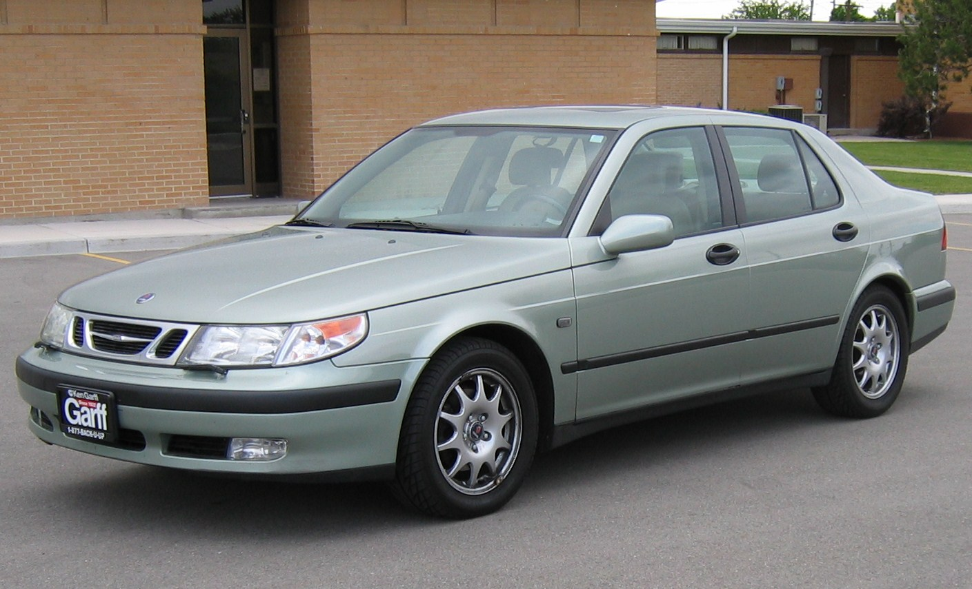 Drivers Side